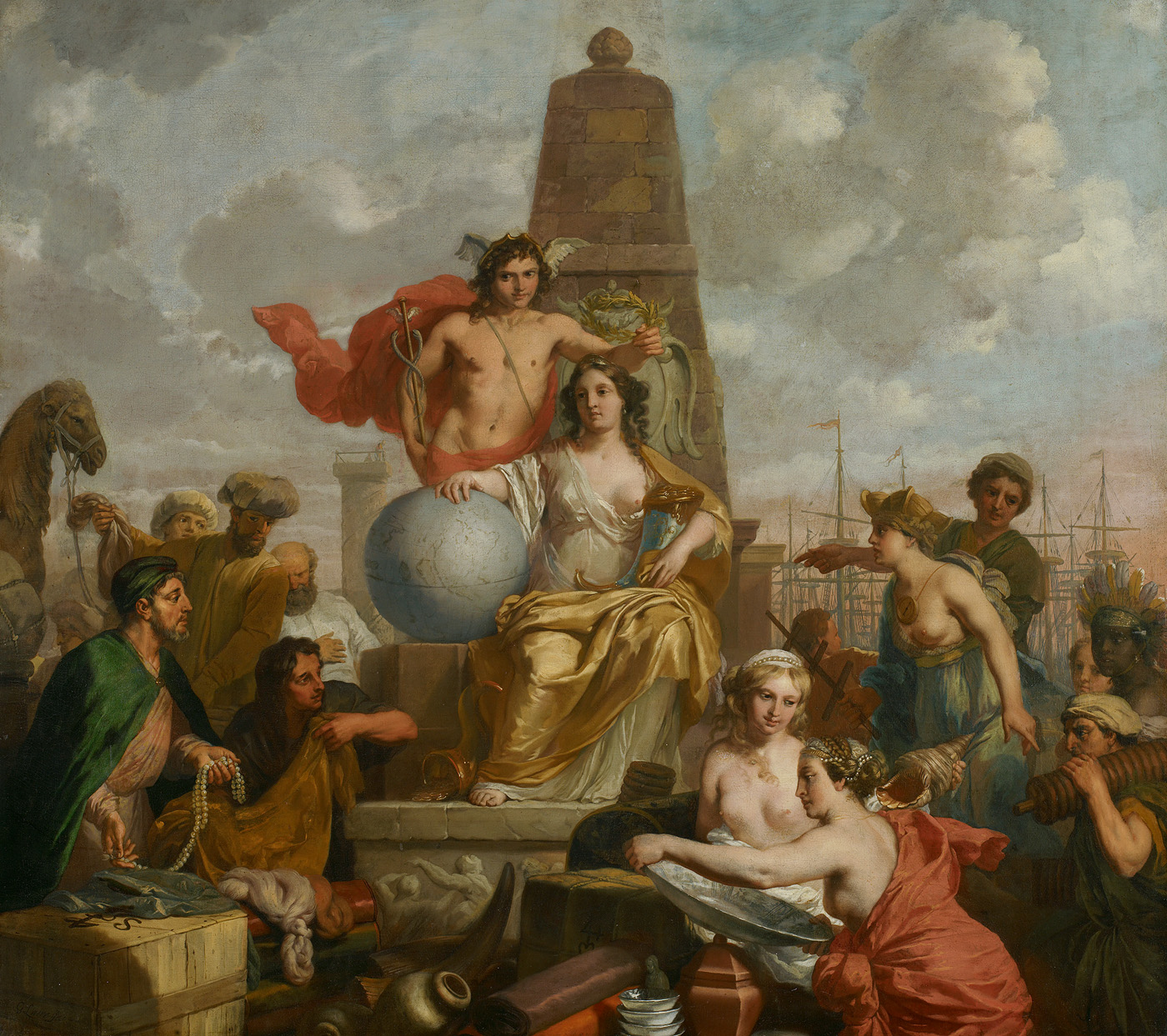 schilderij; allegorie; stedenmaagd